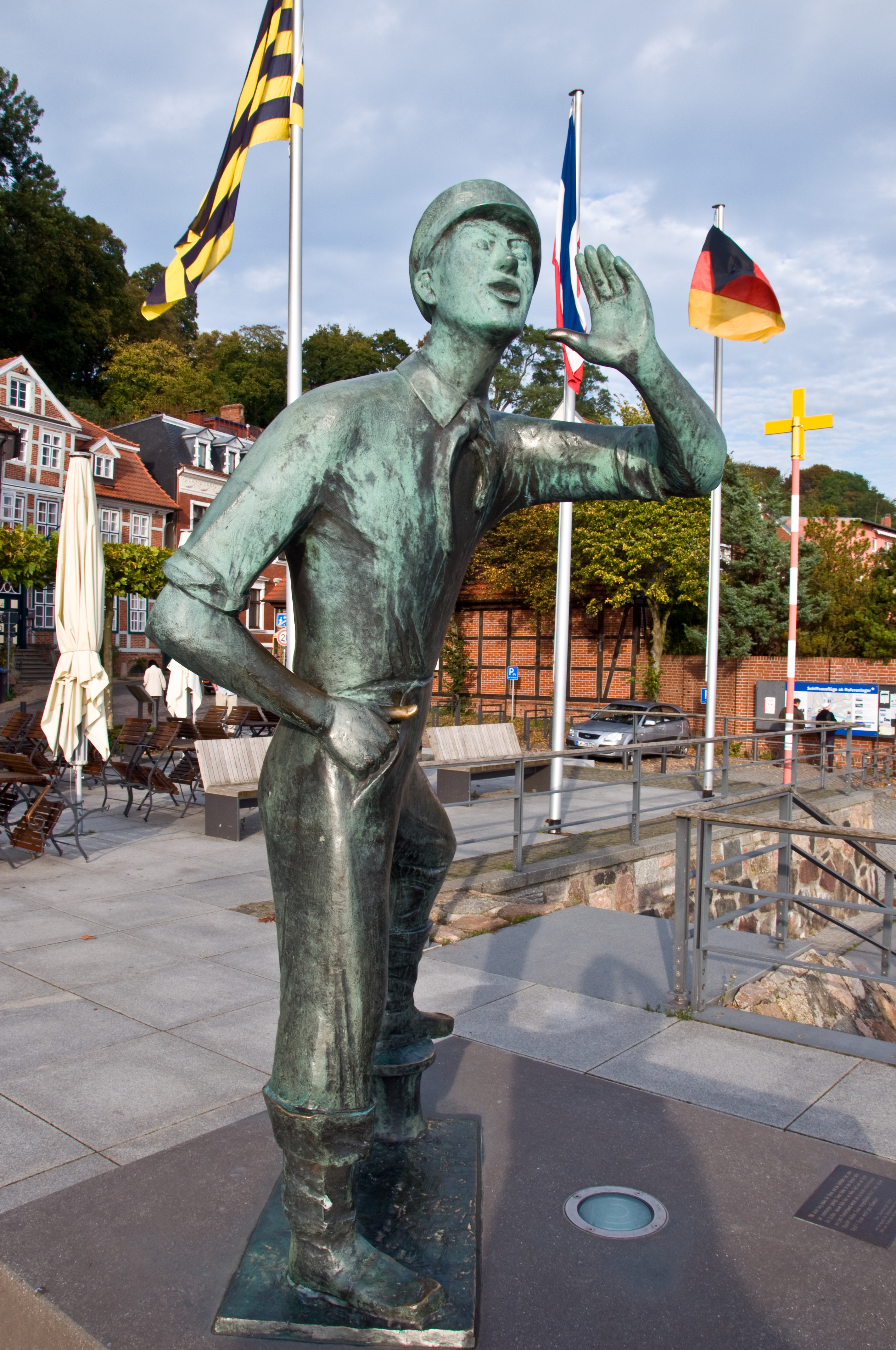 Karlheinz Goedtke: Lauenburger Rufer (1959) Material: Bronze Standort: Lauenburg/Elbe - Elbstraße